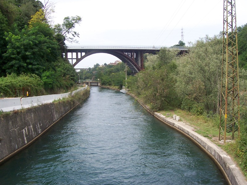 Trezzo sull'Adda - Naviglio Martesana e Ponte Autostrada A4